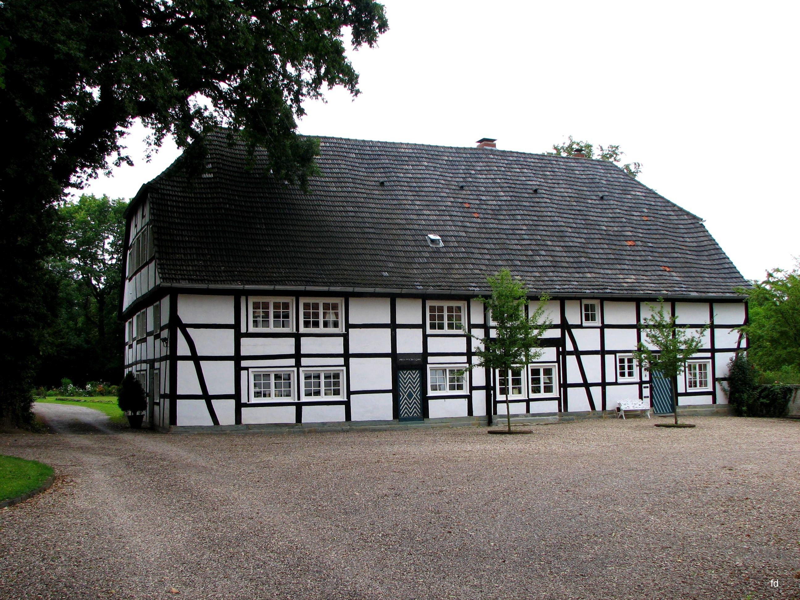 Schloß Haus Sassendorf, WirtschaftsgebäudeThis is a photograph of an architectural monument., no. Bad Sassendorf 20